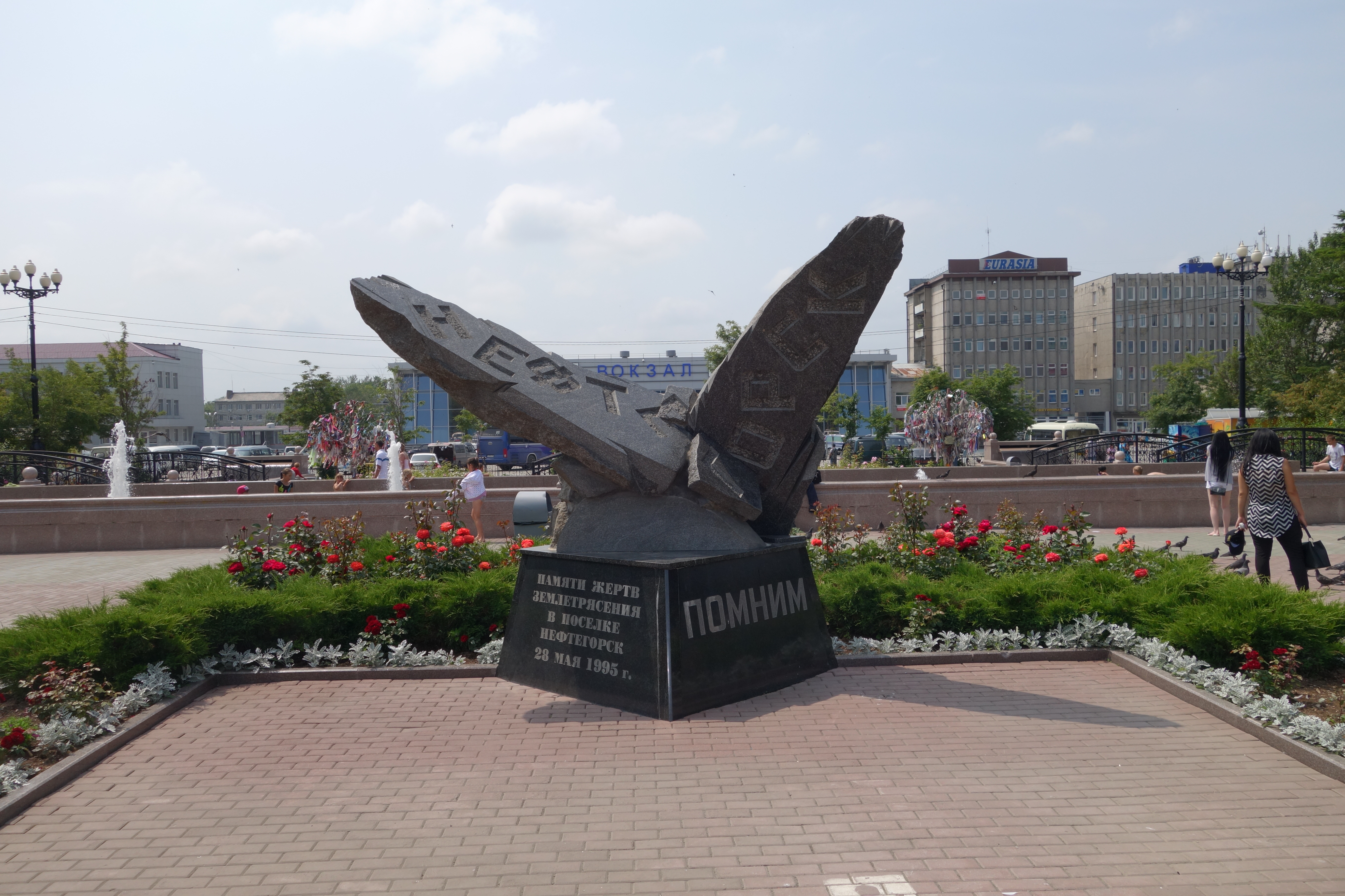 Памятник жертвам землетрясения в Нефтегорске. Южно-Сахалинск.